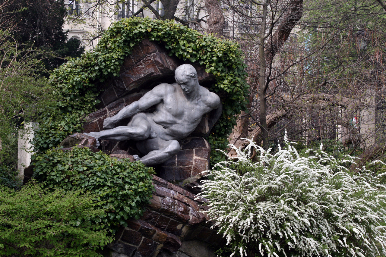 Pierre Roche (Français, 1855-1922): L'Effort (approx. 1900), plon et rocher en grès, Paris, Jardin du Luxembourg.